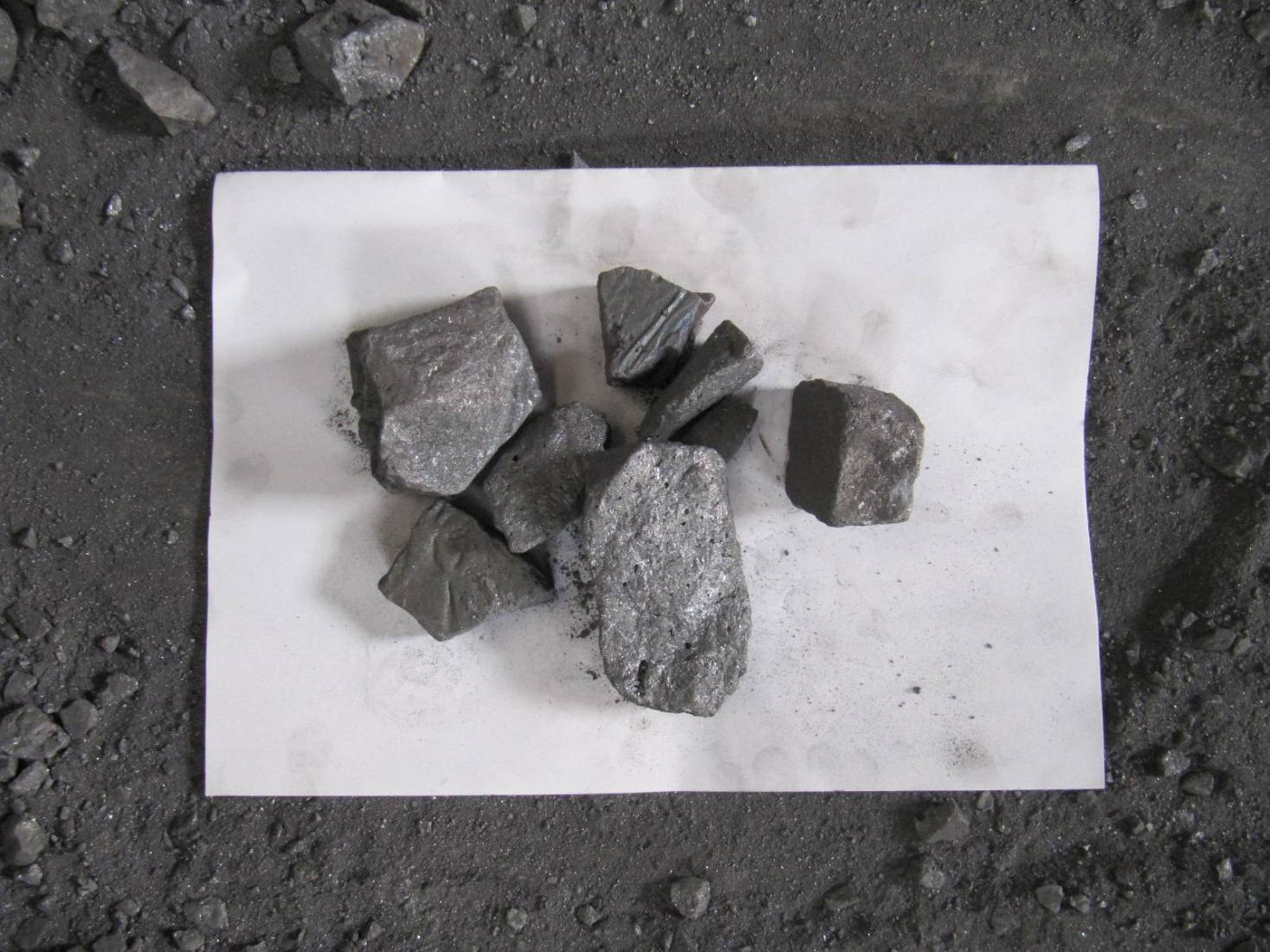 Echantillons de ferrosilicium, utilisés en sidérurgie (posés sur feuille A4)